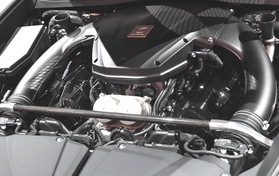 Lxus LFA.